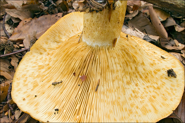 Lactarius scrobiculatus (Scop.) Fr.